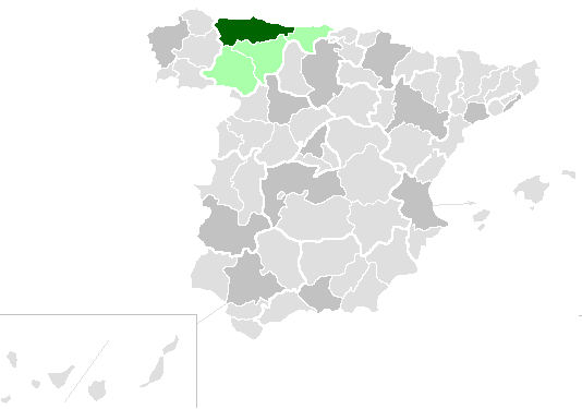 Territorio de la diócesis de Oviedo, mapa